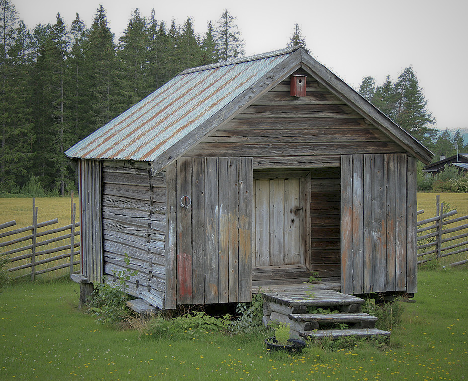 Stabbur på husmannsplassen Sandmo, Snåsa. Freda.